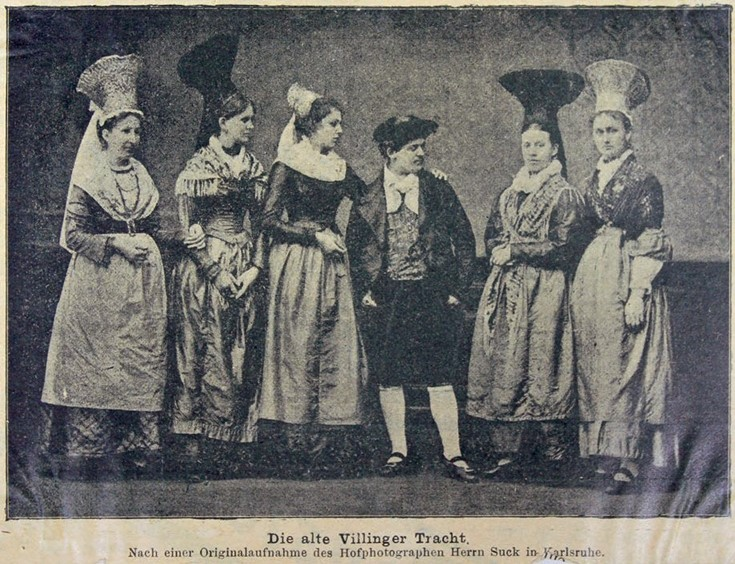 Die alte Villinger Tracht, Photo von Oscar Suck, Karlsruhe; Zeitungsausschnitt aus „Der Schwarzwälder“, 1892.